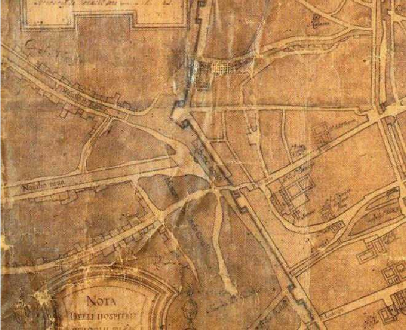 Al centro della mappa, il laghetto di Sant'Eustorgio (qui chiamato laghetto vecchio), che era situato lungo il fossato delle mura spagnole di Milano e che diede poi origine alla Darsena di Porta Ticinese.